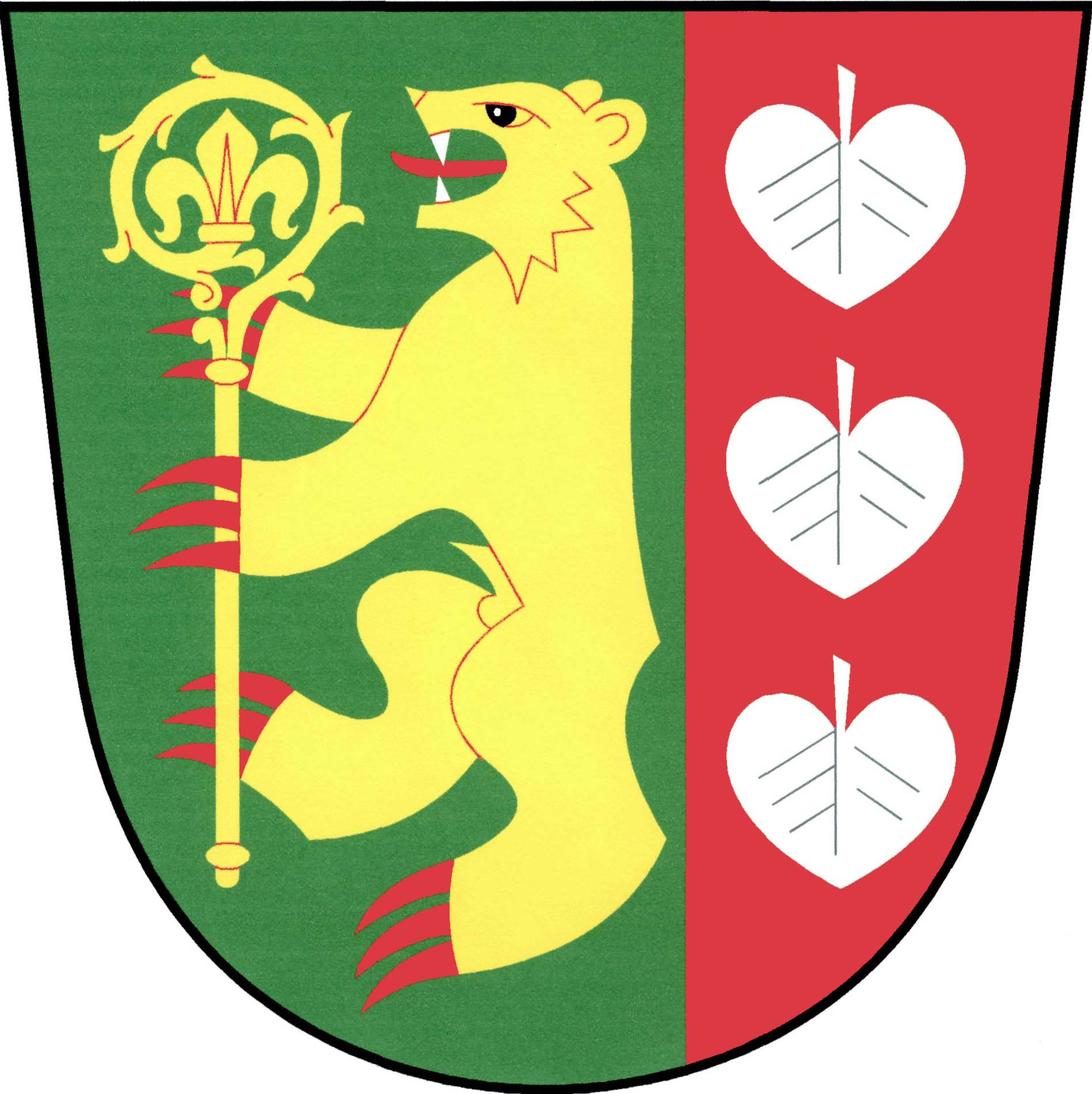 Znak obce Podveky